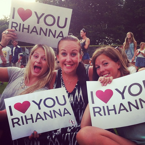 Mari på Rihanna konsert